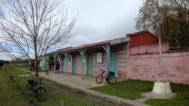 Estación Ruiz del FGCU, ramal Lacroze - Rojas